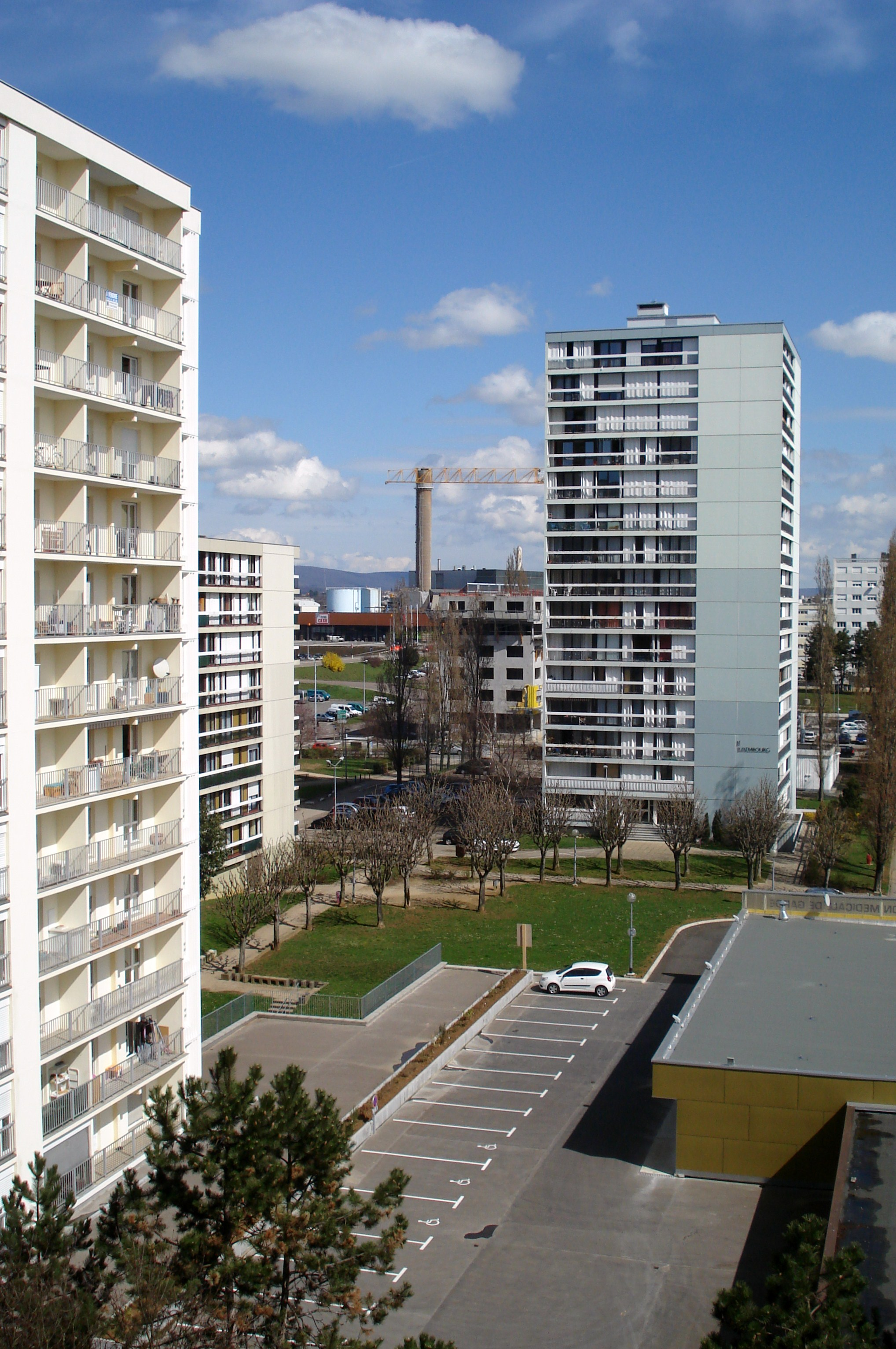 La tour d'Île-de-France à Planoise, dans la ville de Besançon (Doubs, France).